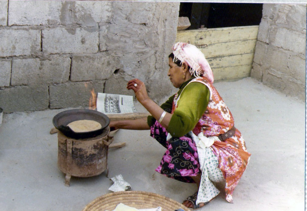 Walon: Cujhaedje do pwin dins ene paile d' årzeye, so on tocoe d' bwès ceclé d' fierلمغربية: كتطيب لخبز فلفرّاح على مجمر ديال لعود مغلّف بلحديد من برّا